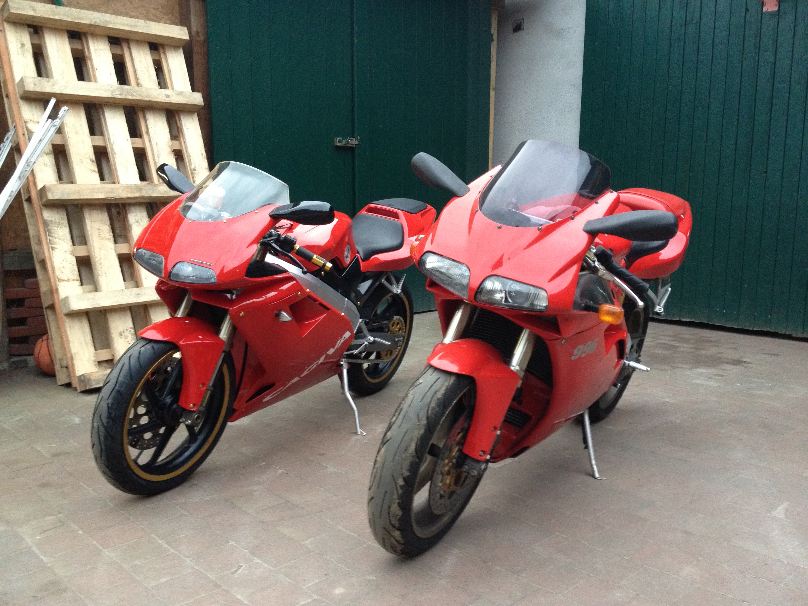 Direkter Vergleich zwischen einer Cagiva Mito Evolution 2 und einer Ducati 996